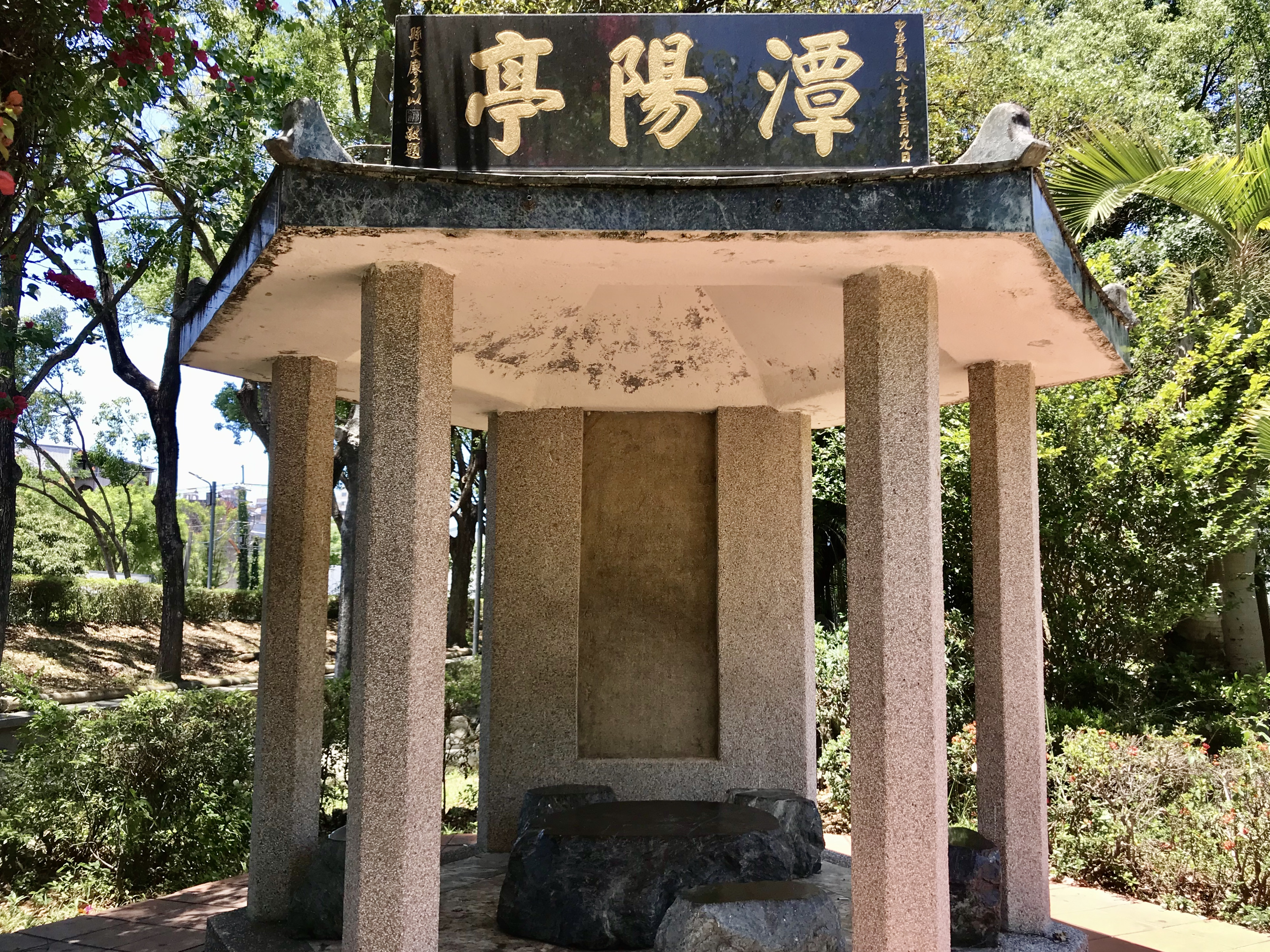 中文（台灣）: 阿里史社碑亭